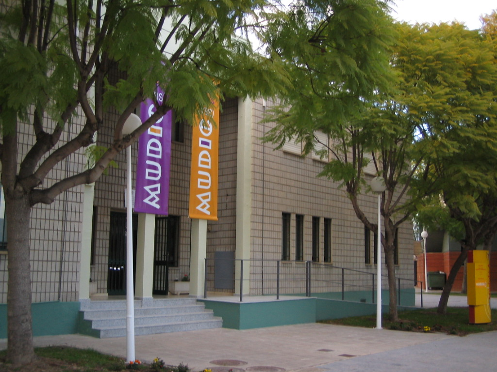 Museo Didáctico e Interactivo de Ciencias de la Vega Baja del Segura (Campus de la Universidad Miguel Hernández de Desamparados [Orihuela])